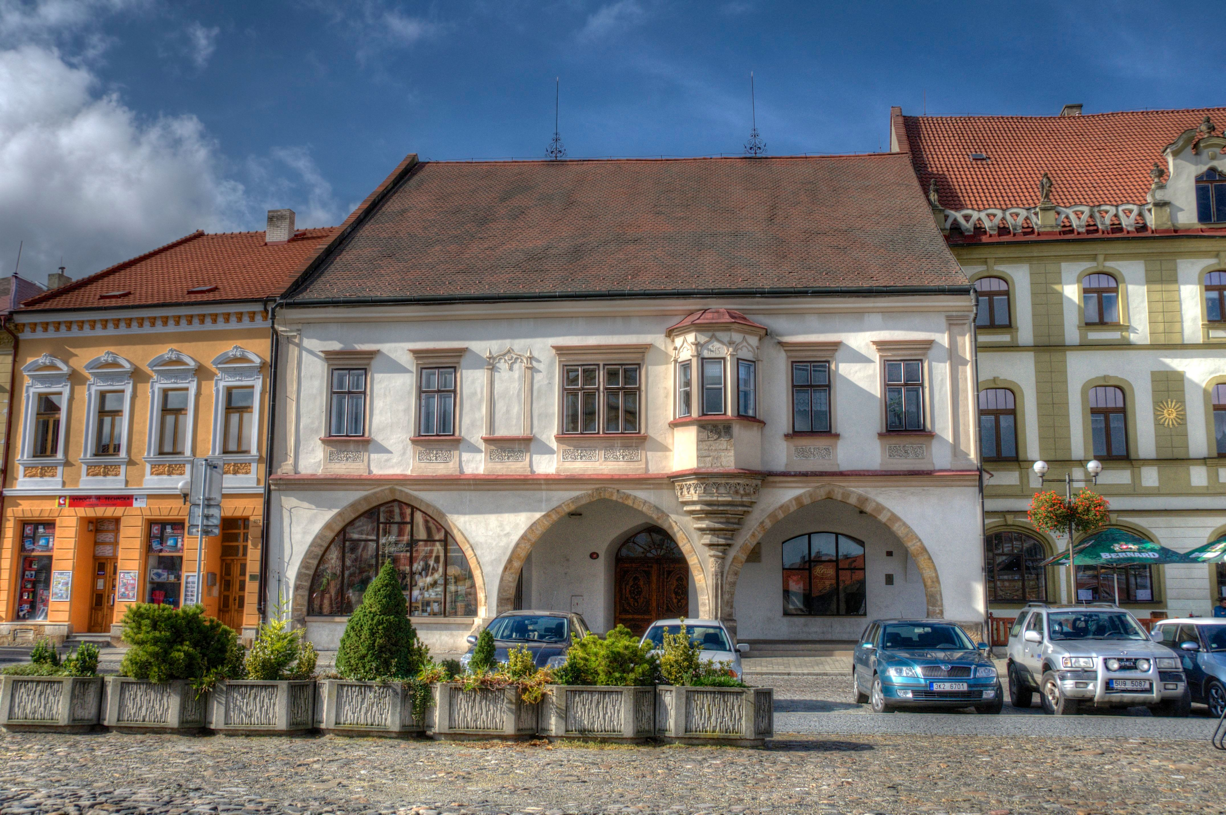 Dům čp. 184, Mírové náměstí 184, Kadaň.